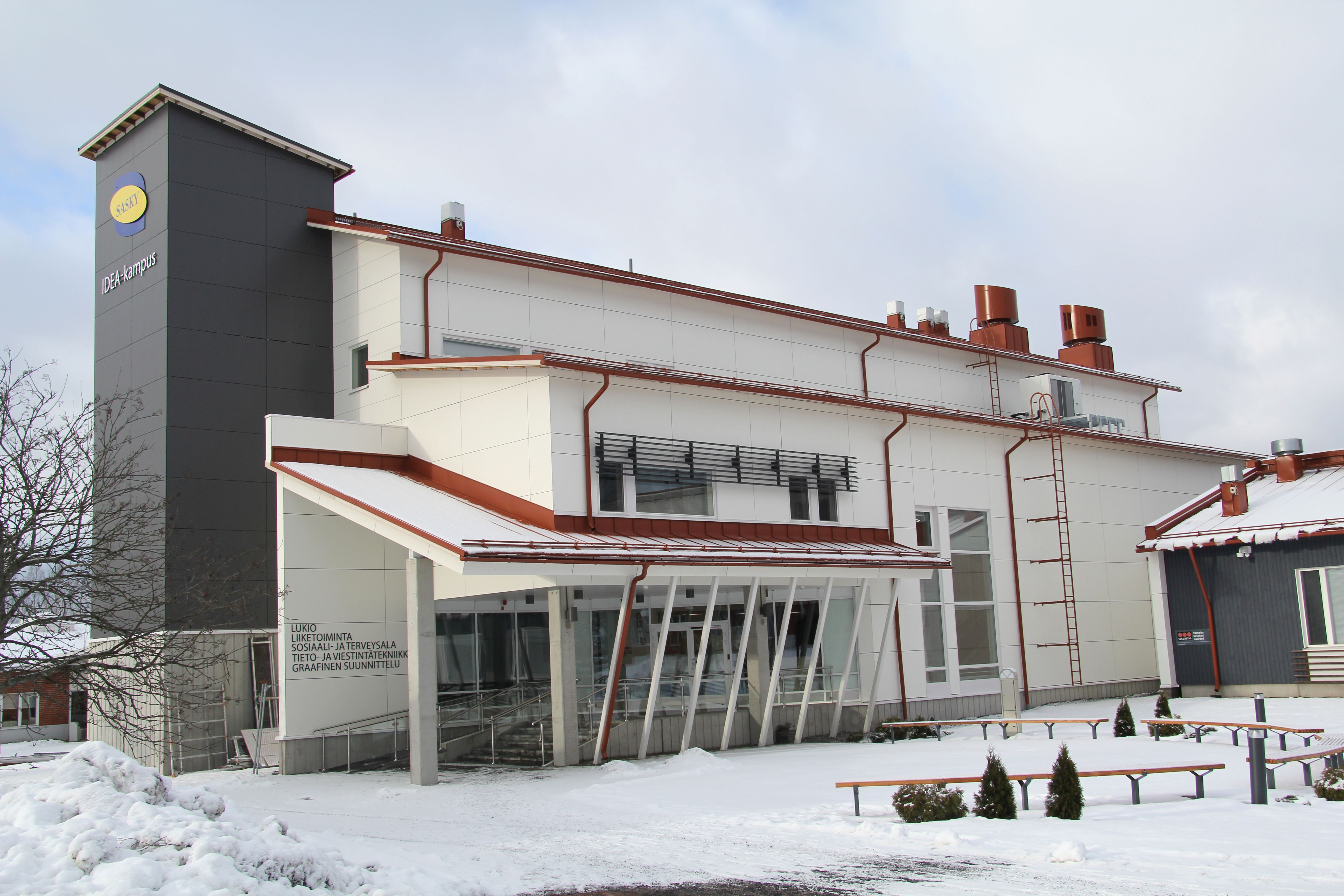 SASKY koulutuskuntayhtymän IDEA-kampuksen uudisrakennus Ikaalisissa, rakennuksessa toimivat Ikaalisten lukio, Ikaalisten kauppaoppilaitos sekä osa Ikaalisten käsi- ja taideteollisuusoppilaitoksen aloista.